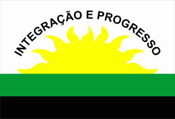 Bandeira do município de Rio Preto da Eva, Amazonas, Brasil.